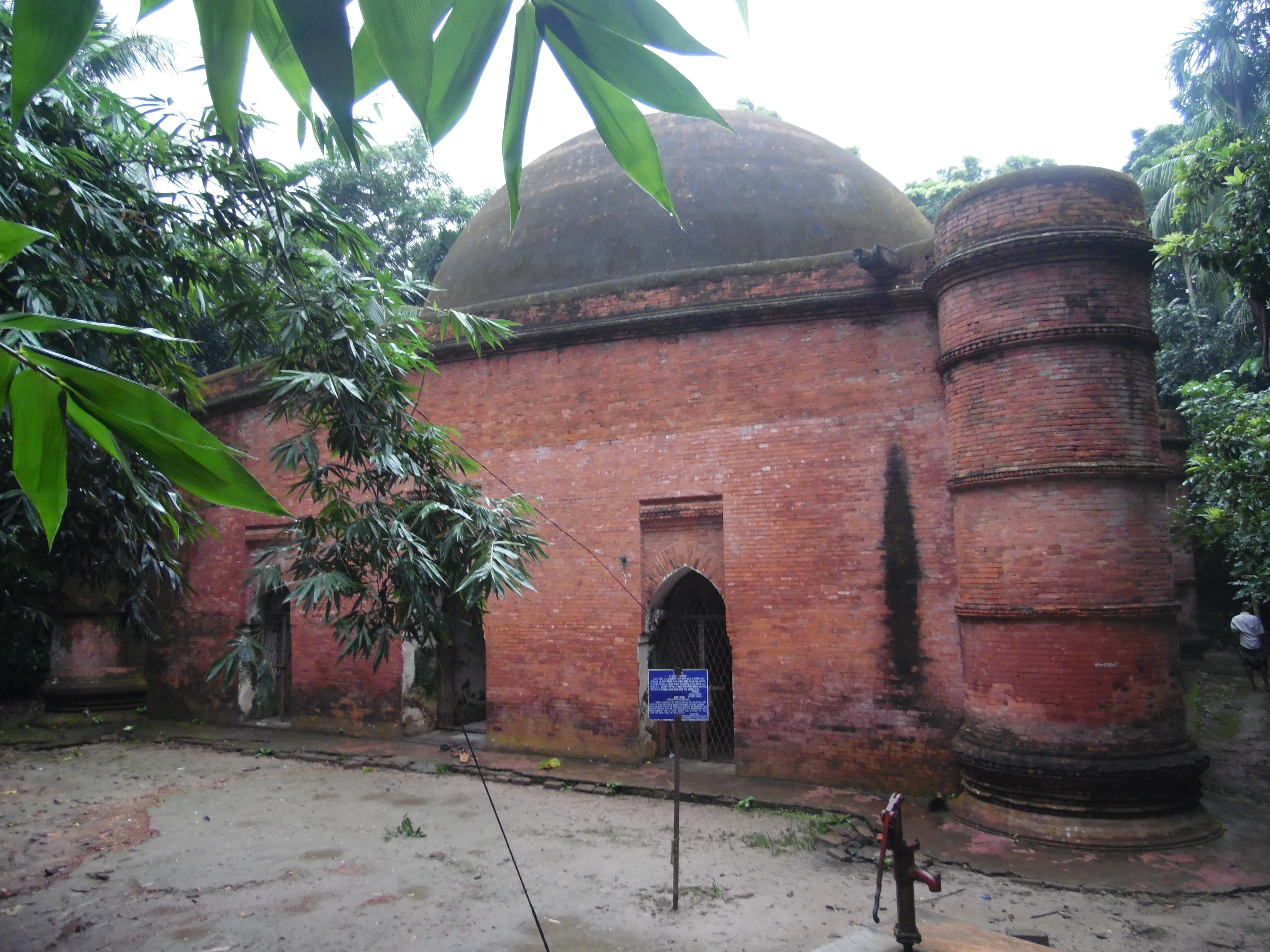 রণবিজয়পুর মসজিদ